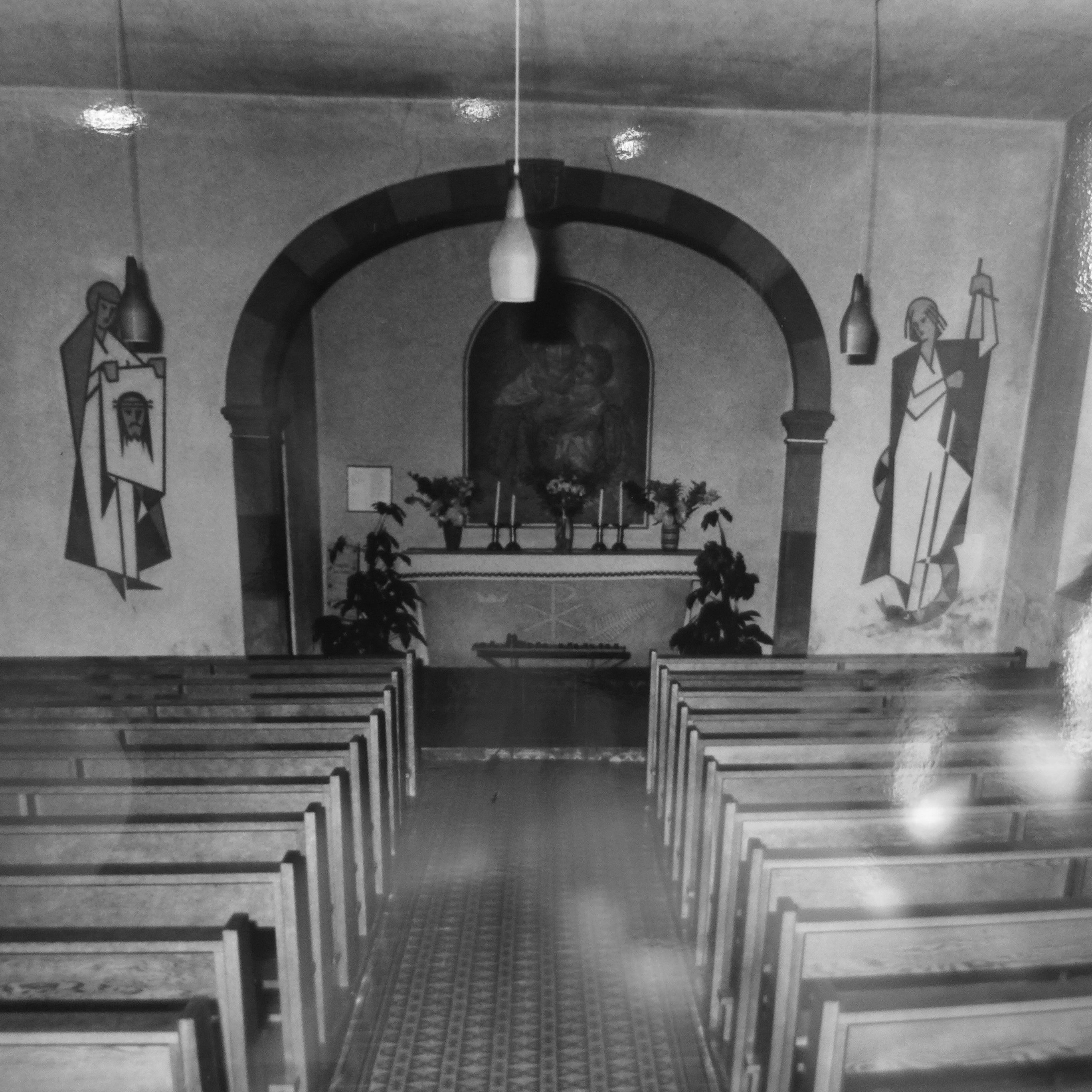 Körprich, Kapelle, Inneres, Chorraum mit früheren Wandmalereien der heiligen Veronika und des heiligen Michael von Arnold Mrziglod (1921–1984)